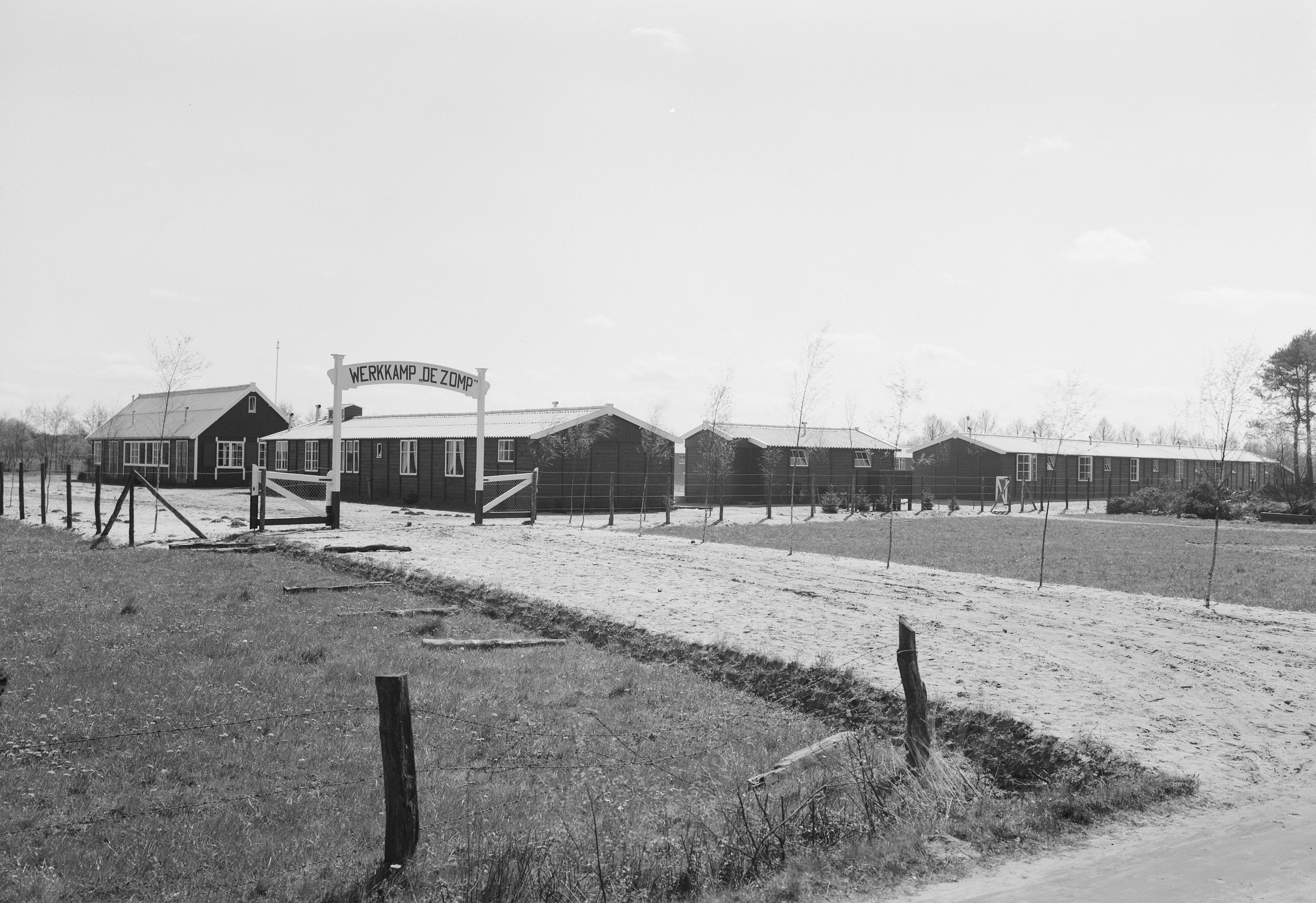 Collectie / Archief : Fotocollectie Nederlandse Heidemaatschappij Reportage / Serie : [ onbekend ] Beschrijving : werkkampen, overzichten, de zomp Datum : ongedateerd Locatie : Gelderland, Ruurlo Trefwoorden : overzichten, werkkampen Persoonsnaam : de zomp Fotograaf : [onbekend] Auteursrechthebbende : Nationaal Archief Materiaalsoort : Negatief (zwart/wit) Nummer archiefinventaris : bekijk toegang 2.24.06.02 Bestanddeelnummer : 162-1370 Reacties Geplaatst door bapu op 20 maart 2016 - 12:06. De werkkampen van de Heidemij, die dienden voor de 'werkverschaffing' tijdens de crisistijd in de jaren 30 van de 20e eeuw, zijn later door de duitse bezetters gebruikt om eerst joden, zigeuners, gestraften etc. te 'huisvesten'. Later werden de kampen gebruikt als doorvoerkampen en 'werkkampen' dan wel gevangenissen van de duitsers.